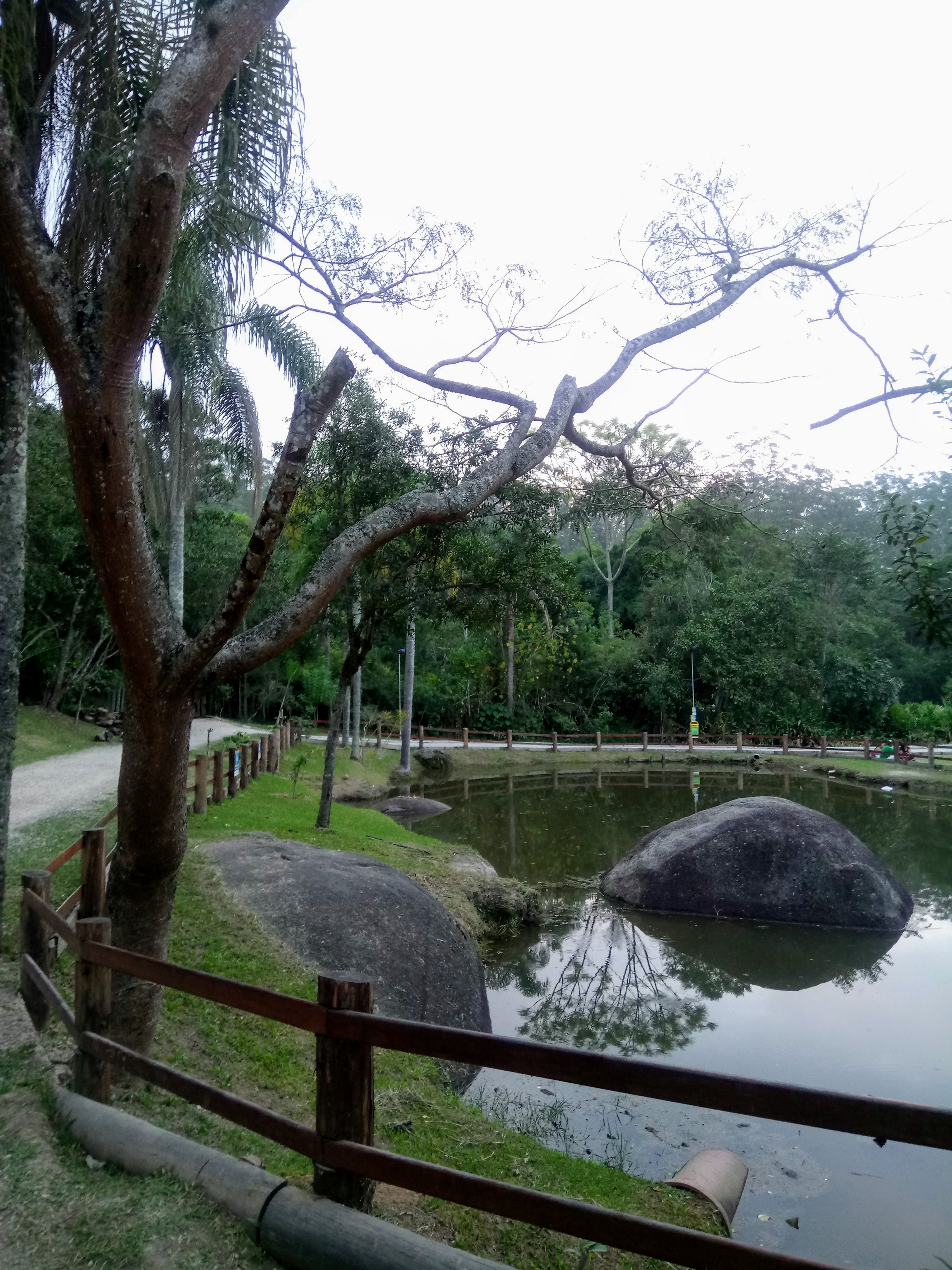 Lago do Parque da Gruta Santa Luzia